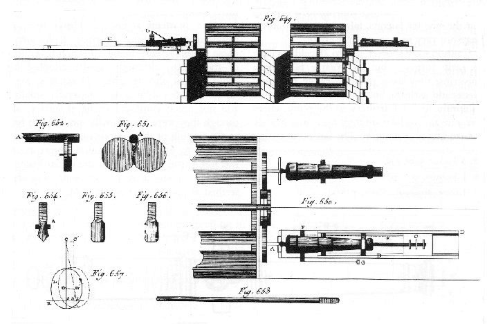 Maritz_method